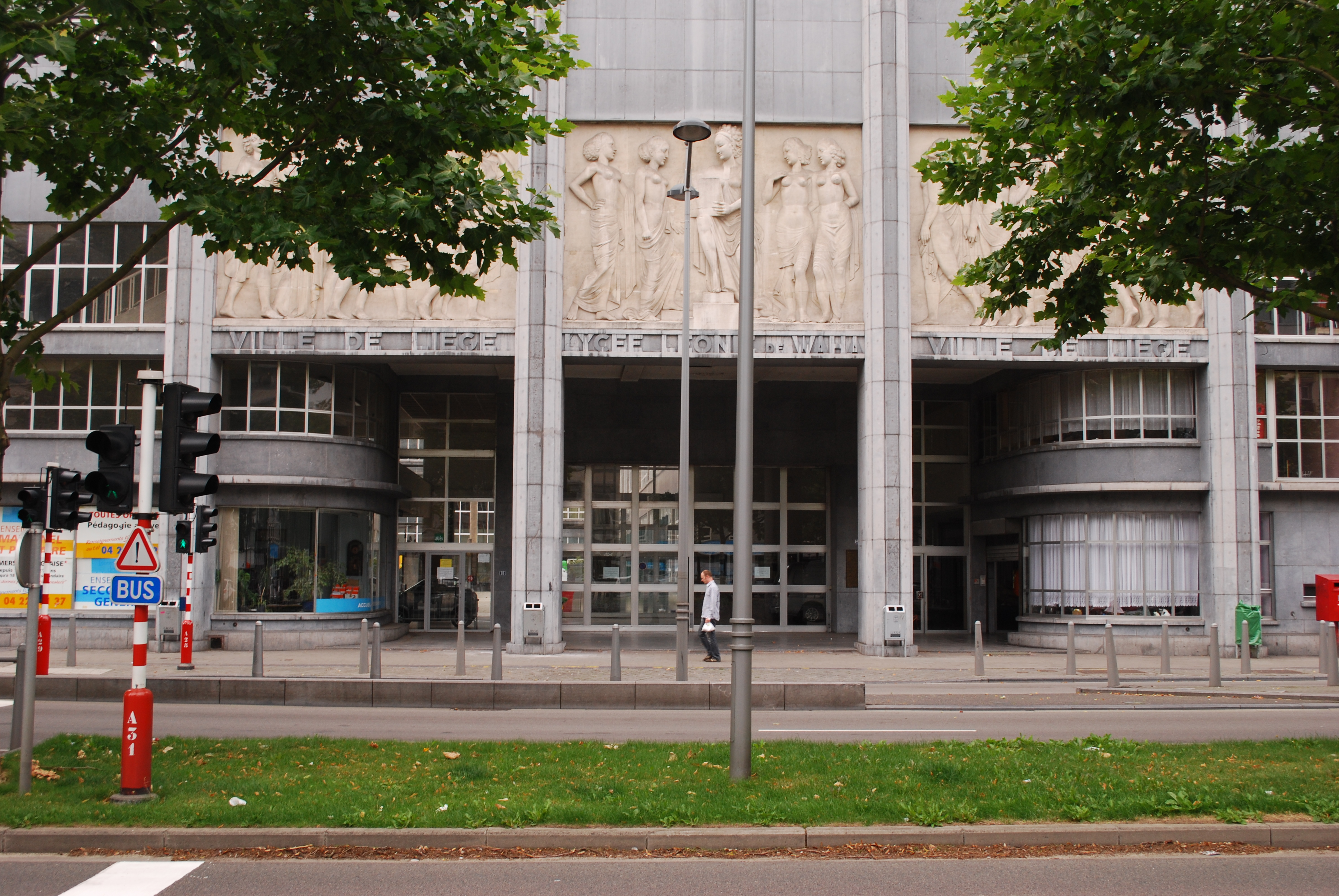 Le Lycée Léonie de Waha, sur le boulevard d'Avroy à Liège.